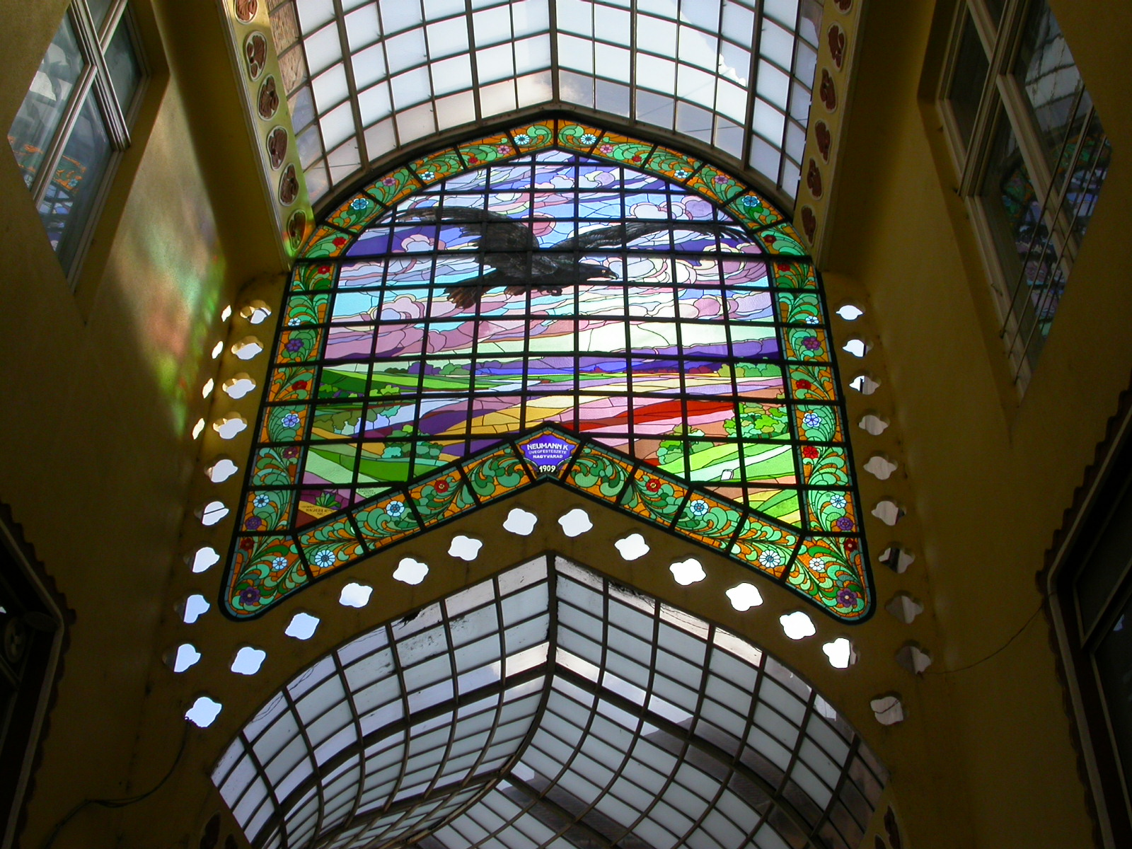 Palatul "Vulturul Negru" 1907-1908